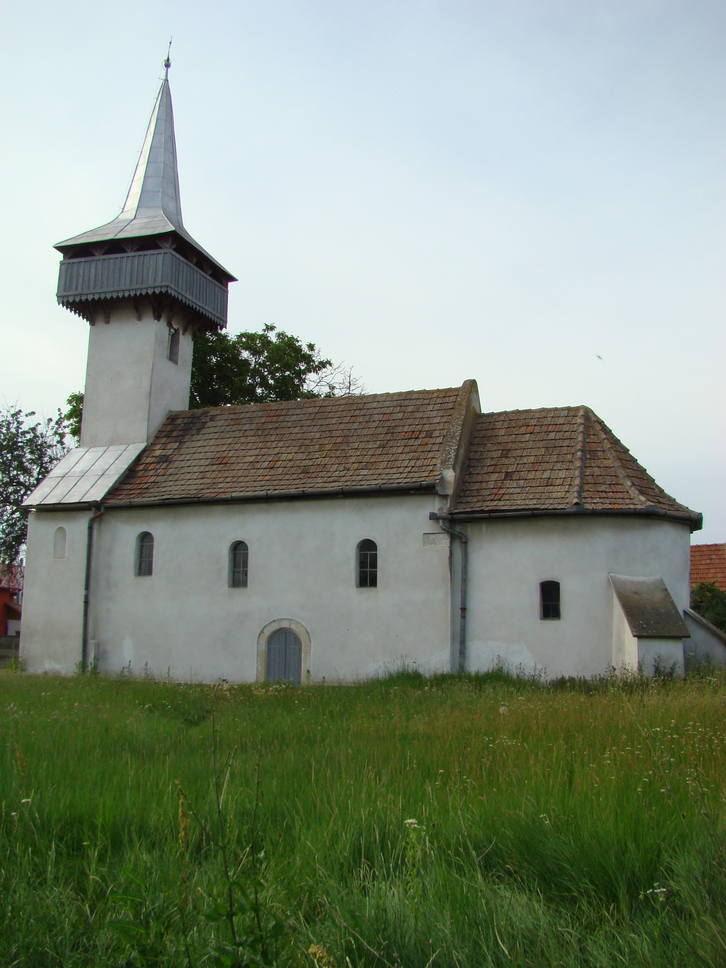 Biserica reformată, sat Rădești; comuna Rădești, județul Alba